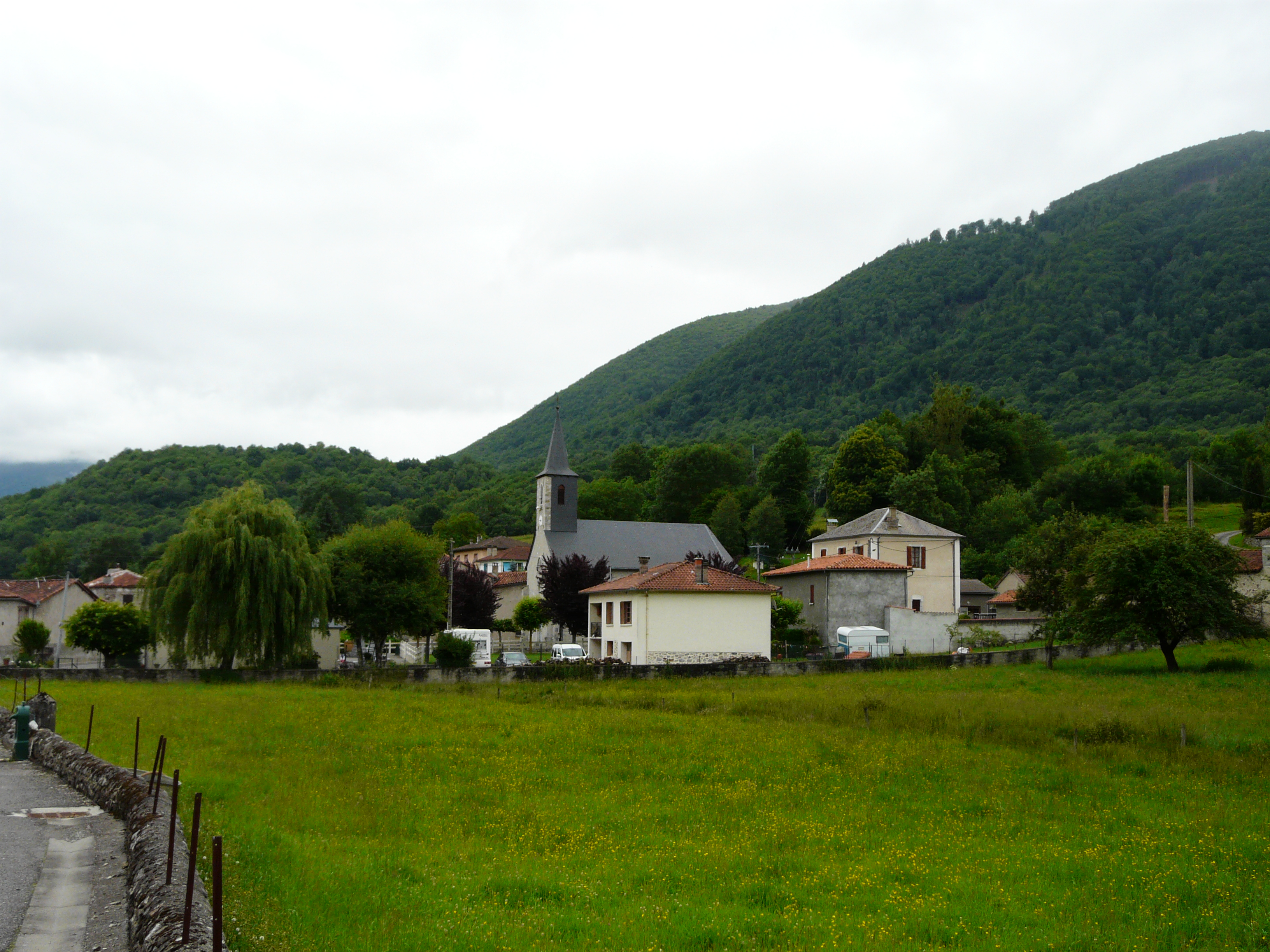 Le village de Cazarilh, Hautes-Pyrénées, France.